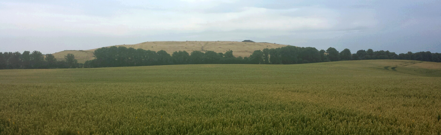 Die Deponie Ihlenberg bei Schönberg in Mecklenburg, auch als Deponie Schönberg bekannt, auf dem Gebiet von Selmsdorf gelegen. Aufnahme von Norden aus Richtung Bockholzberg (82 m)